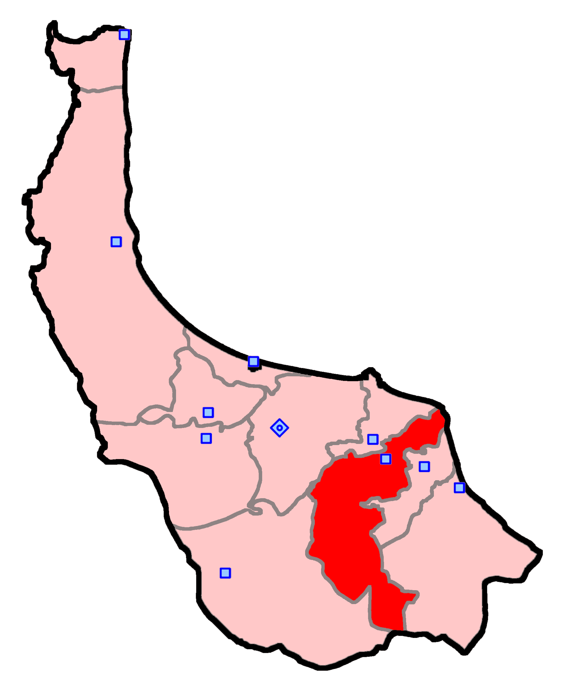 لاهیجان و سیاهکل برای انتخابات مجلس شورای اسلامی